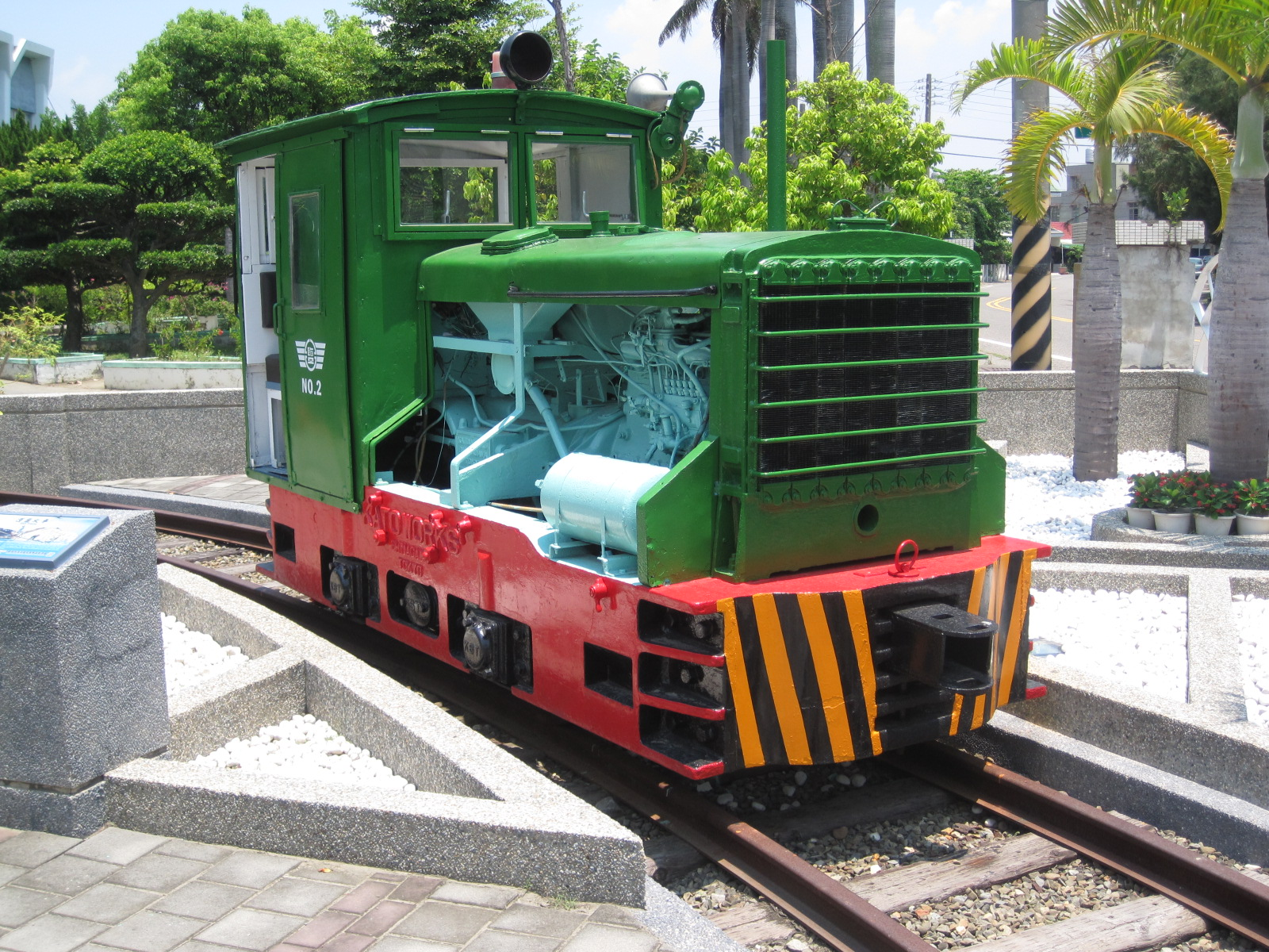 七股鹽場小火車